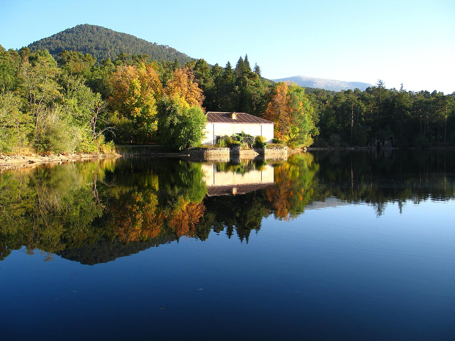 Estanque en los jardines de La Granja (España), llamado "El Mar".